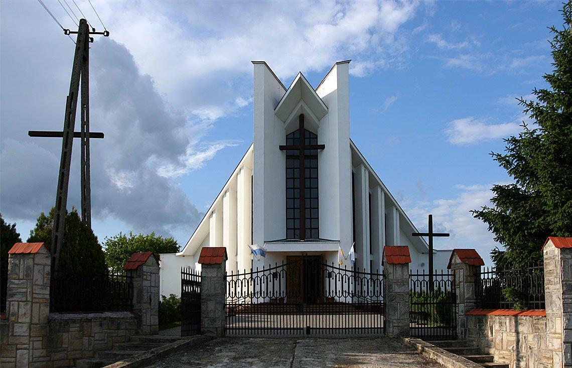 Nowoczesny kościół w Woli Uhruskiej. Zabytkowy jest w sąsiednim Uhrusku